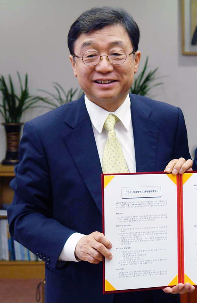 LG전자 CTO 안승권 사장과 서울대 오연천 총장이 지난달 말 서울대학교 총장실에서 미래 성장동력을 함께 찾기 위한 산학협력 MOU를 맺은 후 기념촬영을 하고 있다. ※ LG전자 뉴스룸 에서 관련 보도자료를 확인실 수 있습니다.